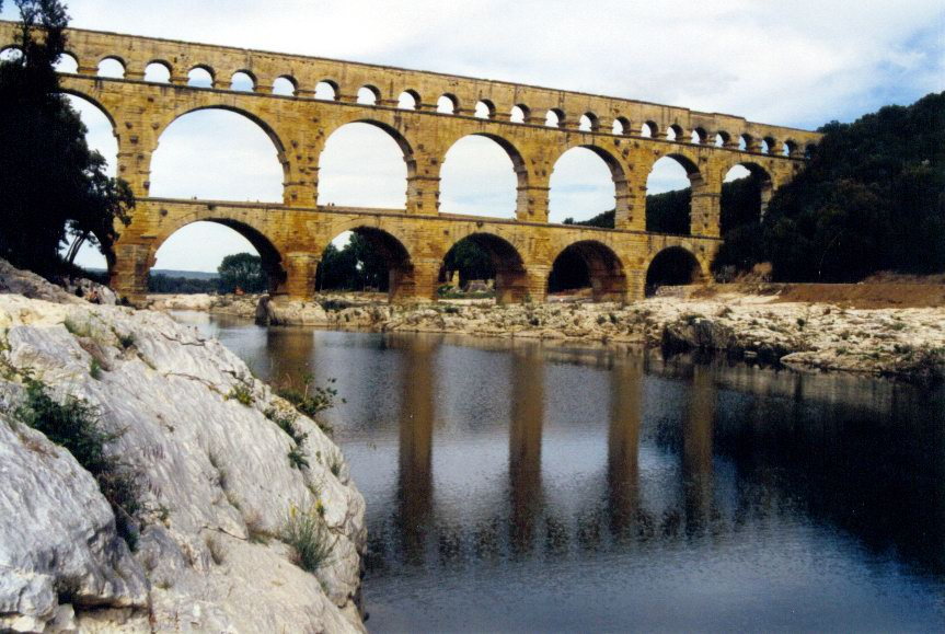 Pont Du Gard im Mai 2003.